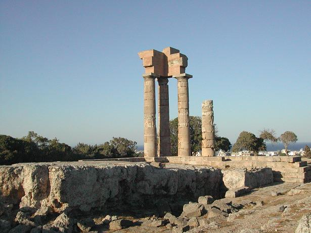 L'Acropoli di Rodi foto di Aldo Ardetti (luglio 2007)